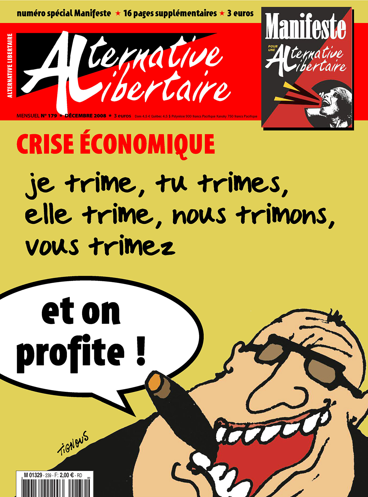 Décembre 2008 Couverture d'Alternative libertaire, mensuel anarcho-communiste français, organe de presse d'Alternative libertaire (1991-2019) puis de l'Union communiste libertaire (à partir de 2019).